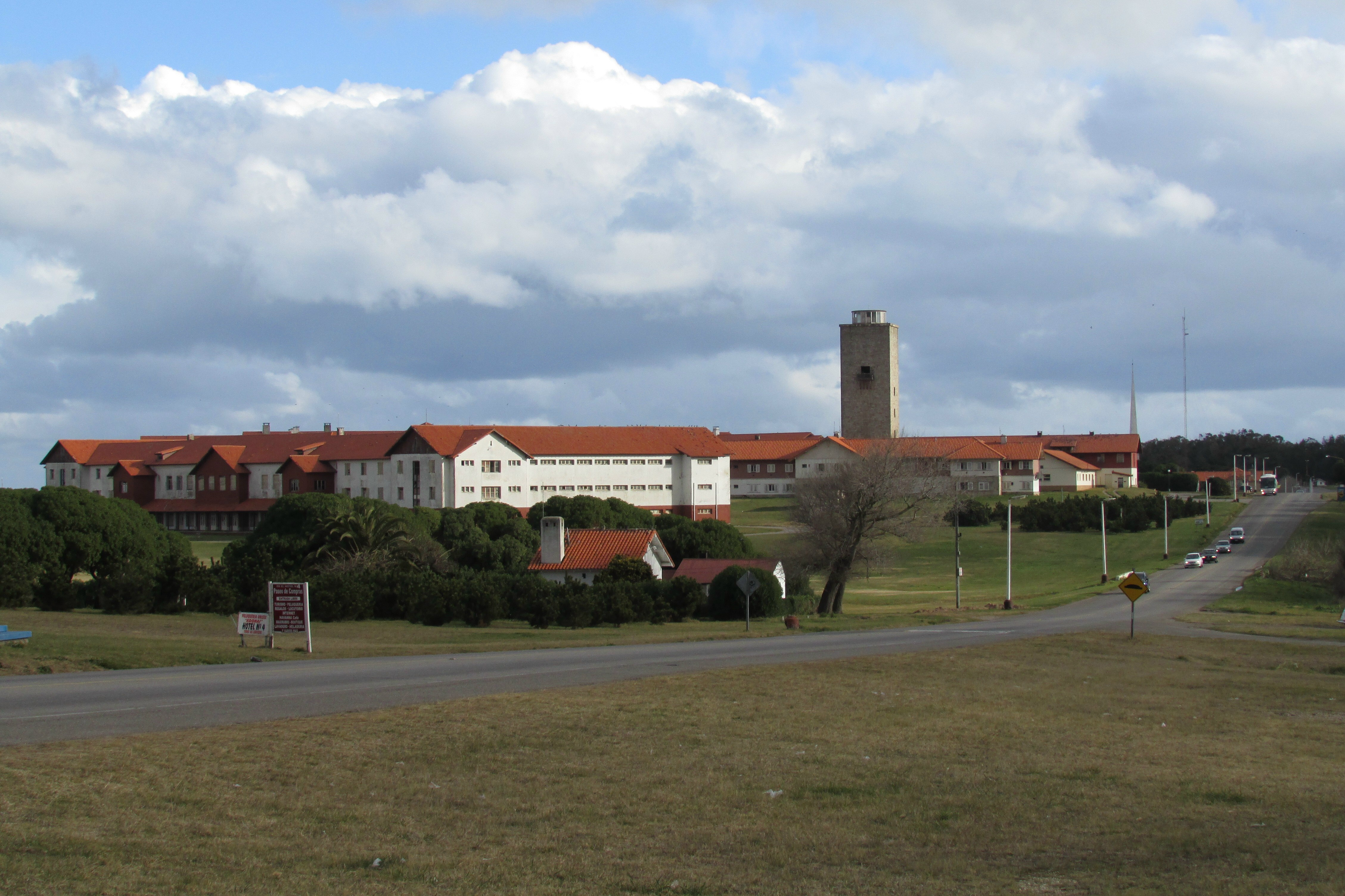 Hotel 3 (adelante) y hotel 4 (atrás) de la Unidad Turística Chapadmalal, partido de General Pueyrredón, provincia de Buenos Aires, Argentina.